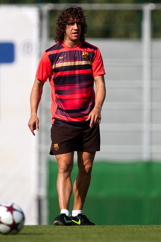 Entrenos antes de la épica de Roma.